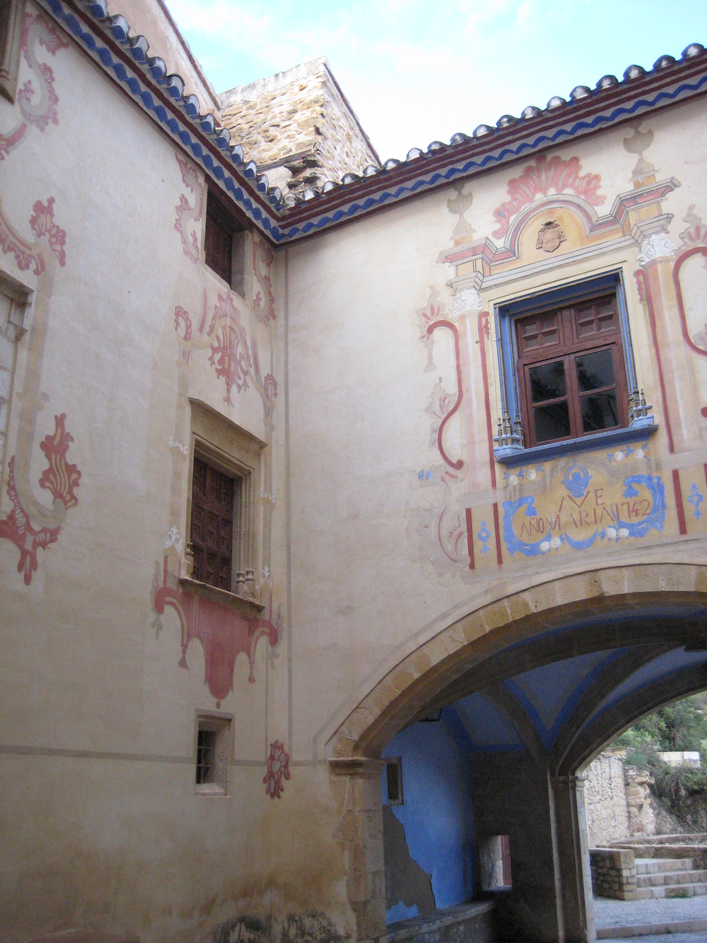 Pati interior de l'hostatgeria del Reial Santuari de la Mare de Déu de la Font de la Salut de Traiguera (Baix Maestrat)